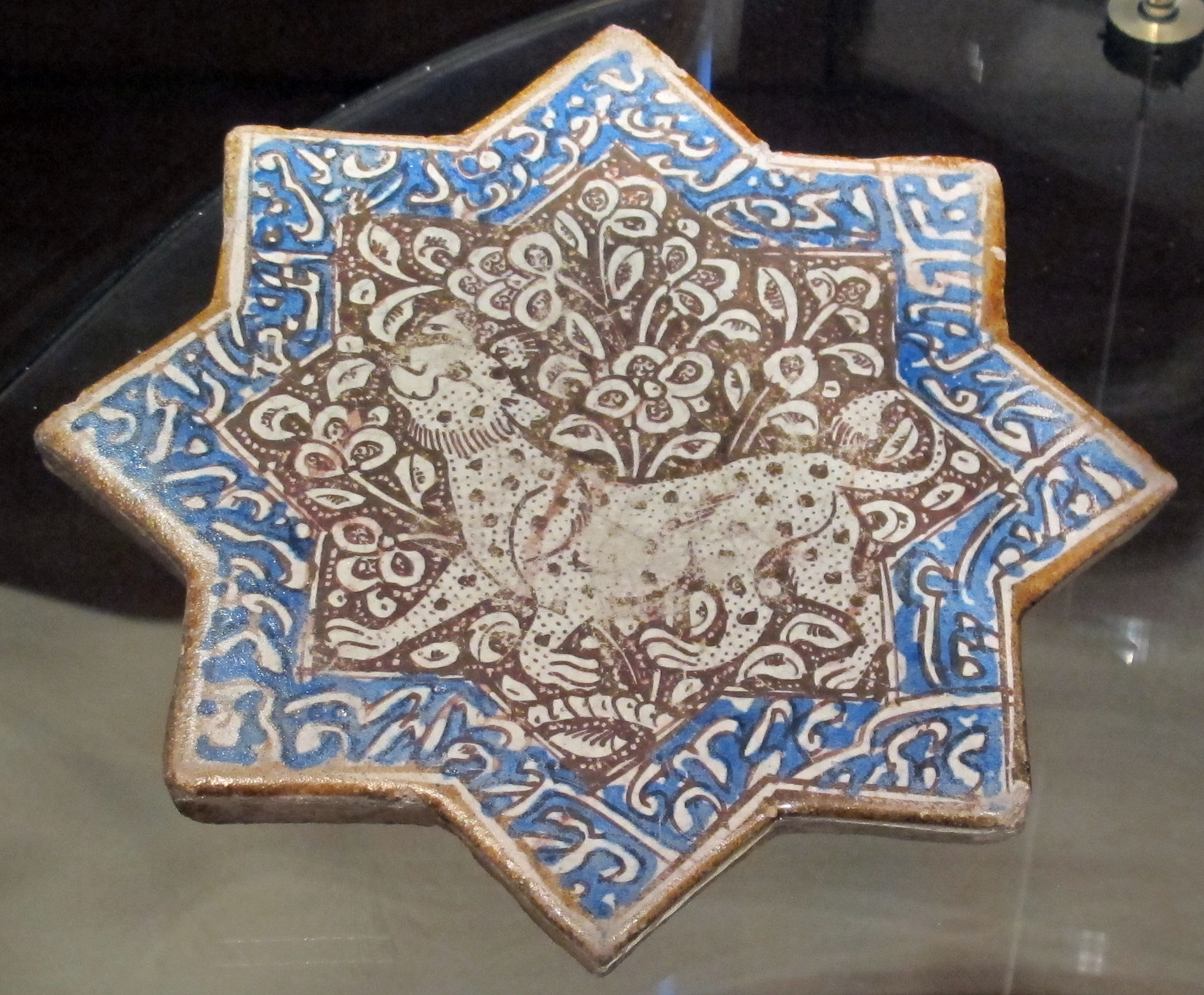 Iran, kashan, mattonella per decorazione parietale, XIII-XIV sec.